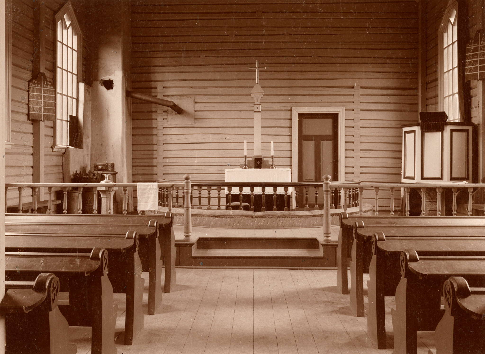 Lisleherad kirke før den fikk altertavle i 1903. Foto: Christian Christensen Thomhav, fra Kulturminnebilder.no.